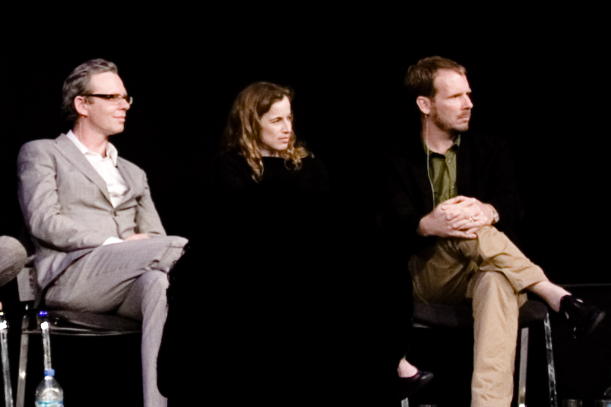 William Russell, Lisa Strausfeld and Abbott Miller